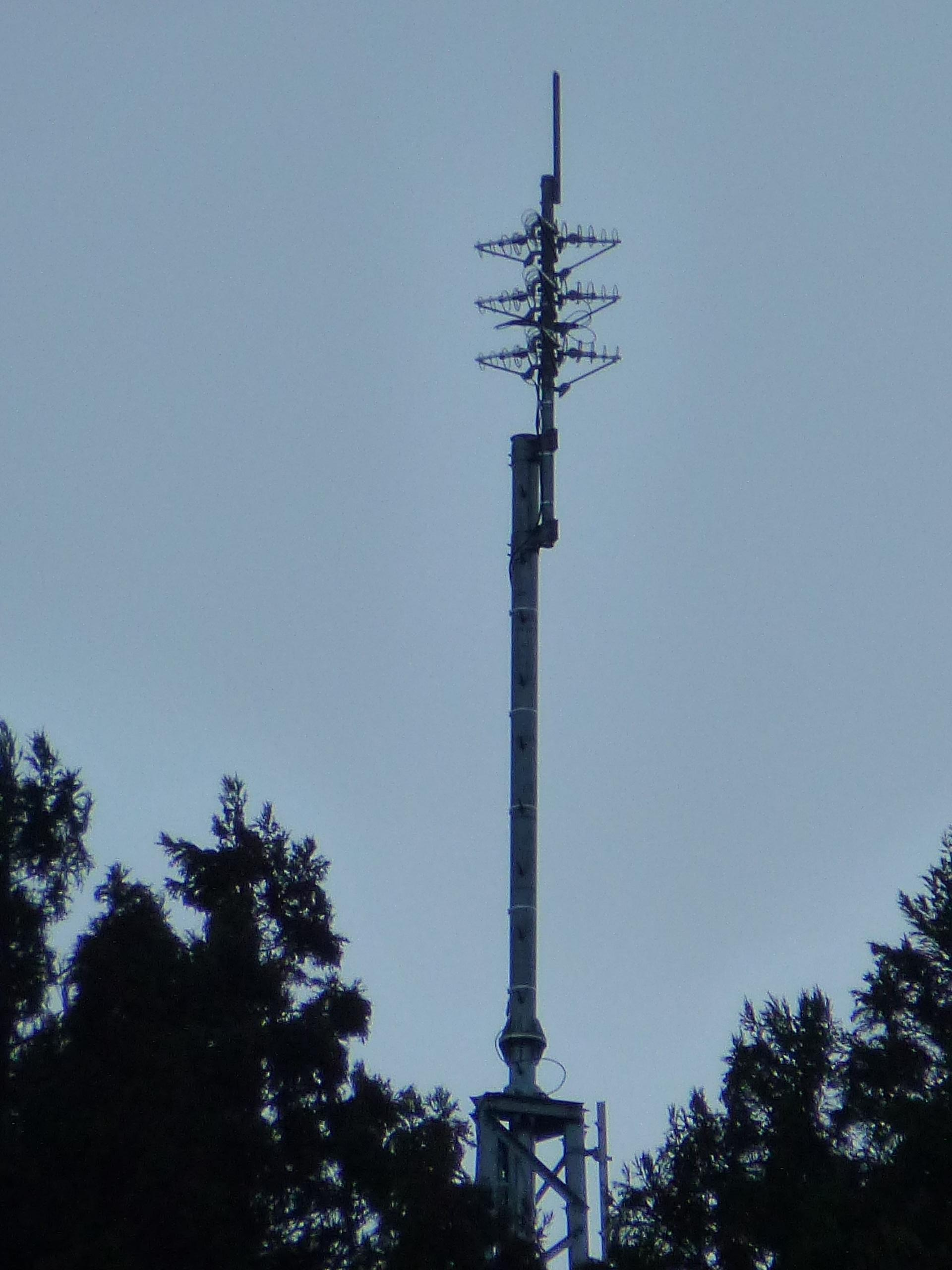 津山石貝老人憩の家付近より